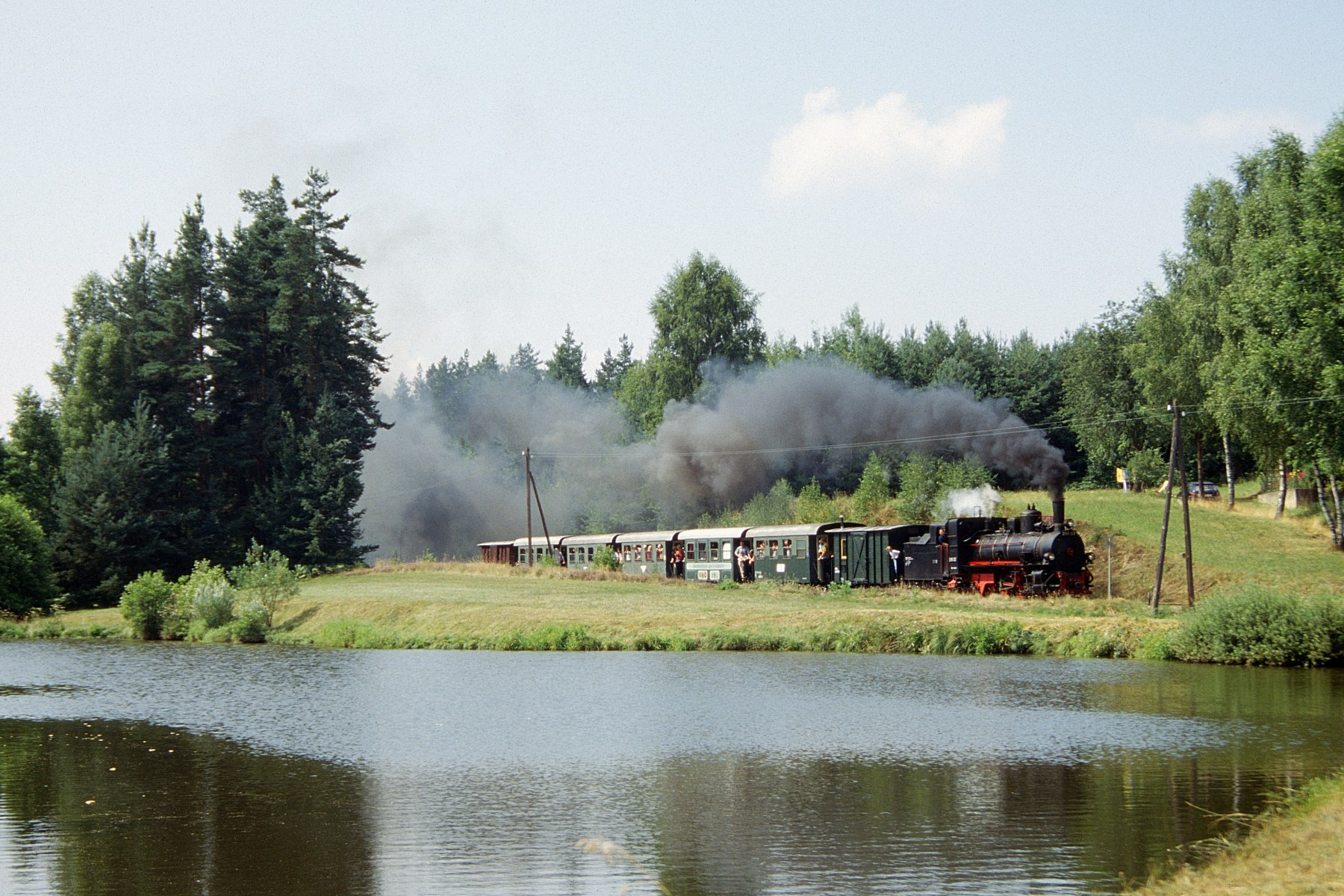 en: ÖBB 399.03 passing the Harrteich near Gopprechts on the northern branch of the Waldviertel Narrow Gauge Railways de: ÖBB 399.03 am Harrteich bei Gopprechts an der Nordstrecke der Waldviertler Schmalspurbahnen.